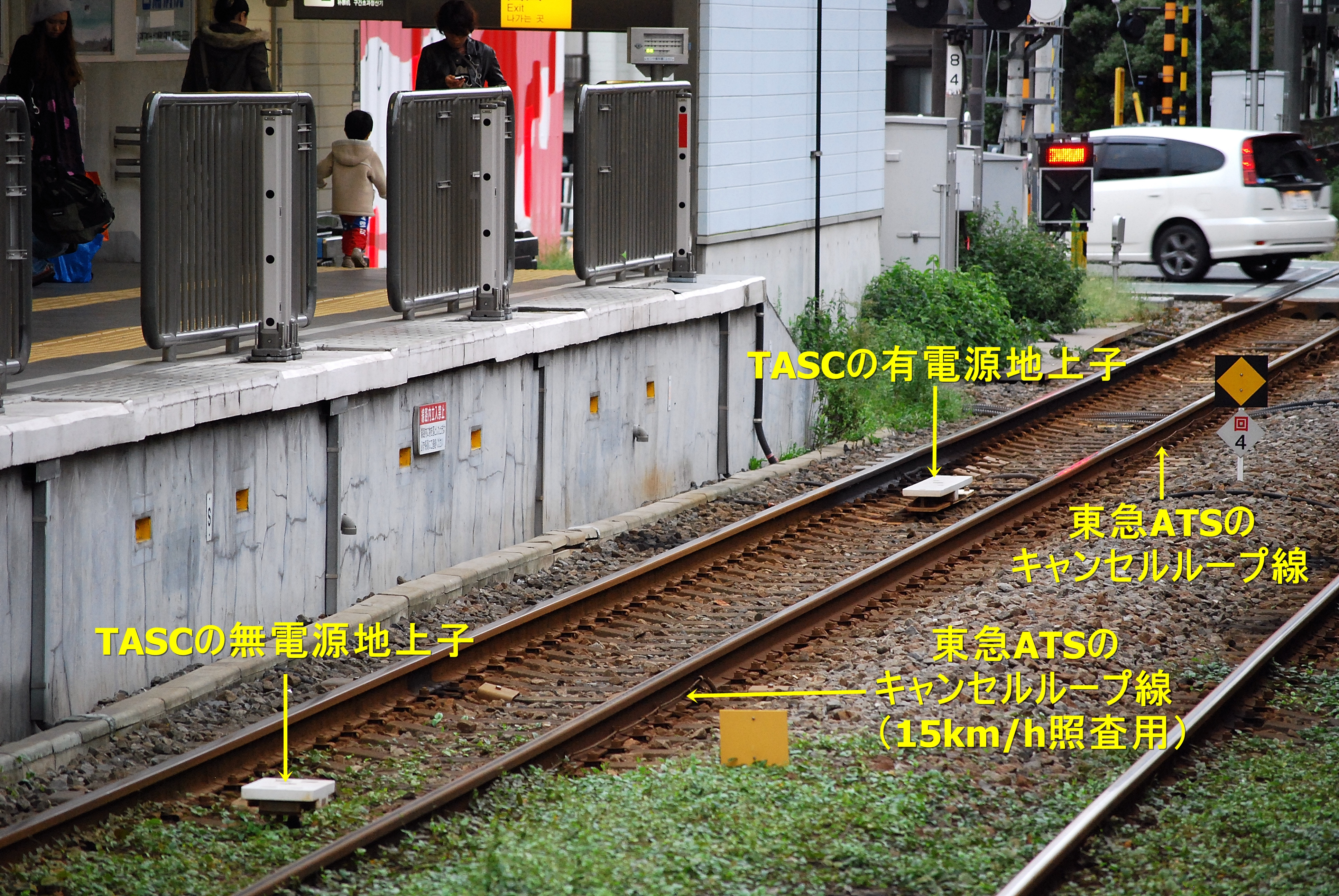 TASC（定位置停止装置）の地上子（ホームからの撮影）信号機近くと黄色四角の標識に線路に添って設置されているループ線は東急ATSのキャンセルループ